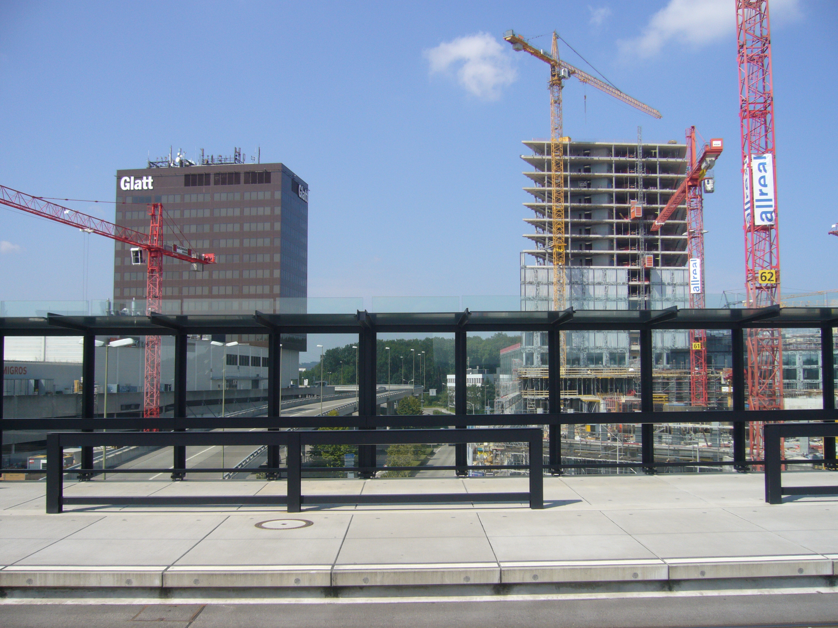 Blick von der Tramway-Haltſtell Glatt gen die Richti zů Walliſſellen; links das Glatt-Hochhauß, rechts Bauſtellen in Rütiäckern.